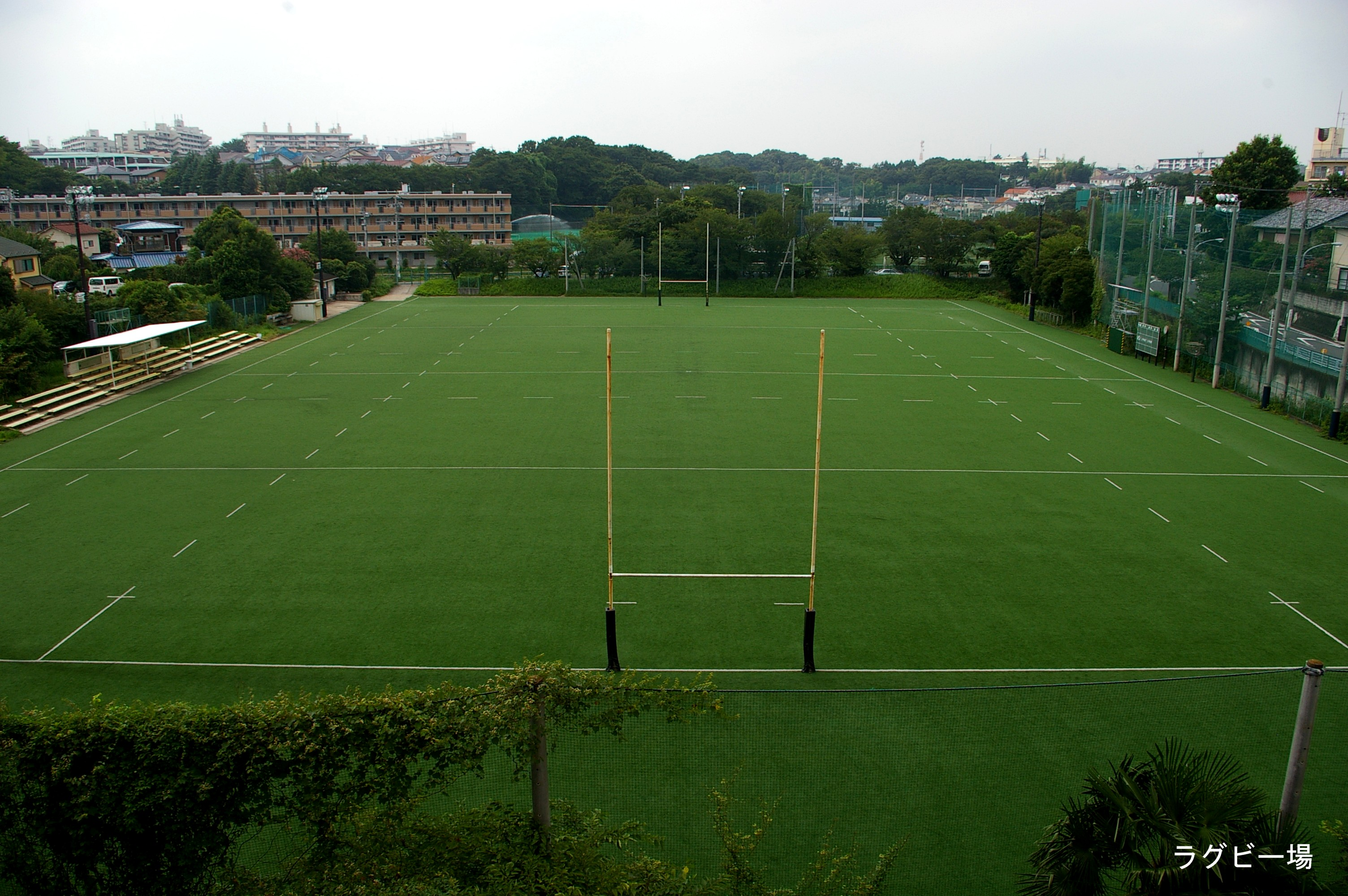 2009横浜市港北区